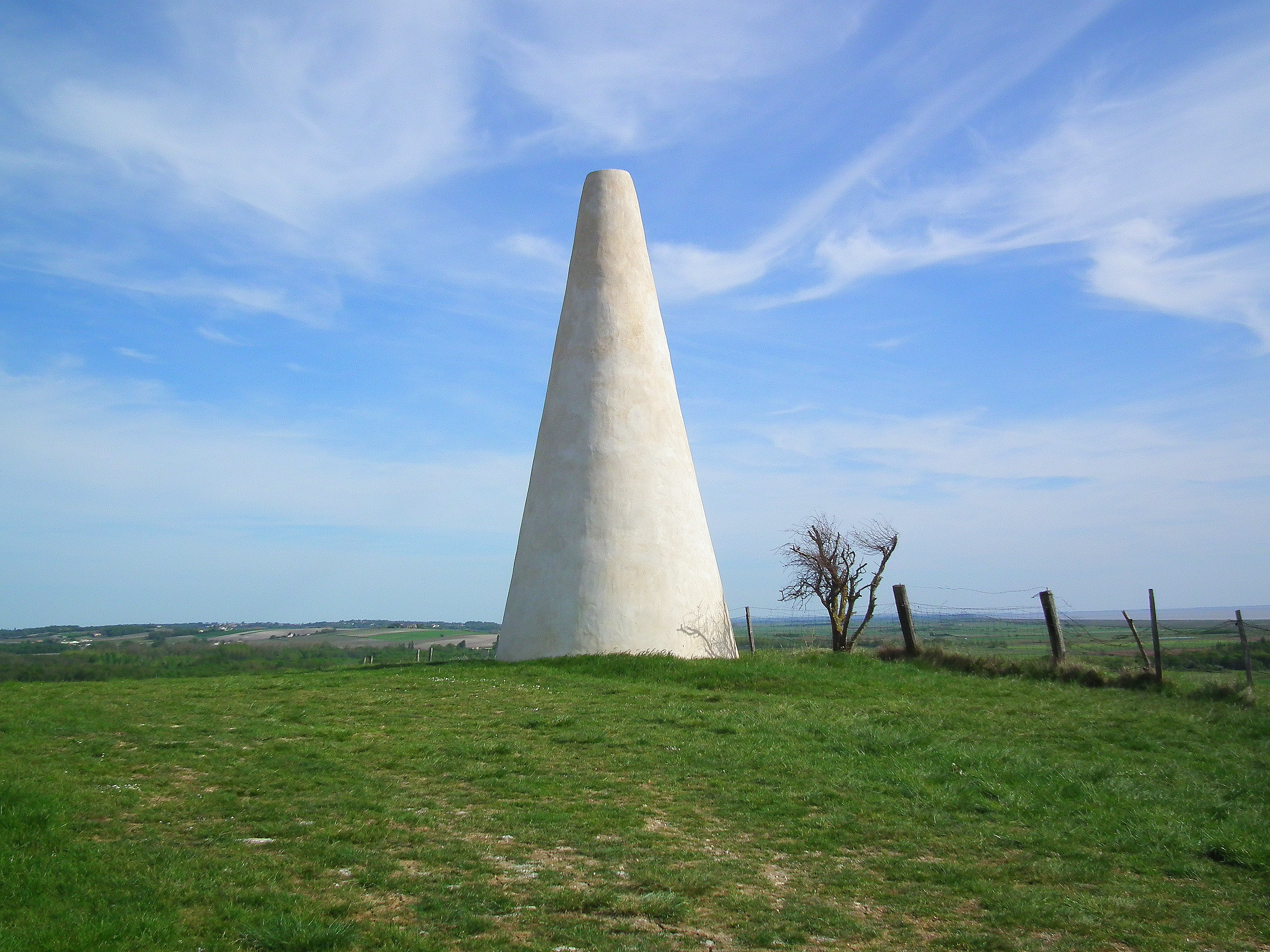 Le fanal de Beaumont (ancien phare romain)